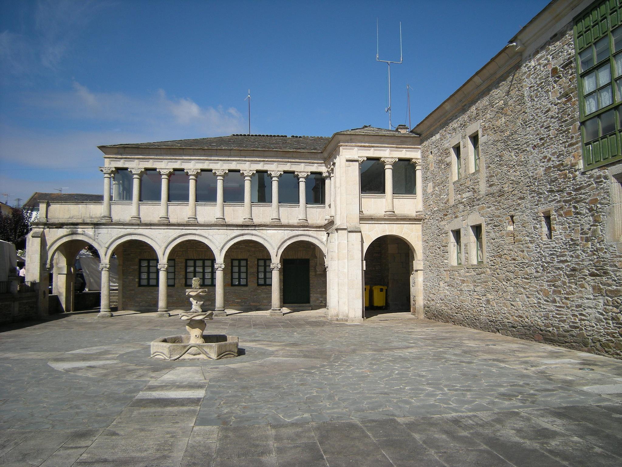 El ala oeste del claustro de de los caballeros o de la hospedería, datado en el siglo XVI, es lo único que se conserva.